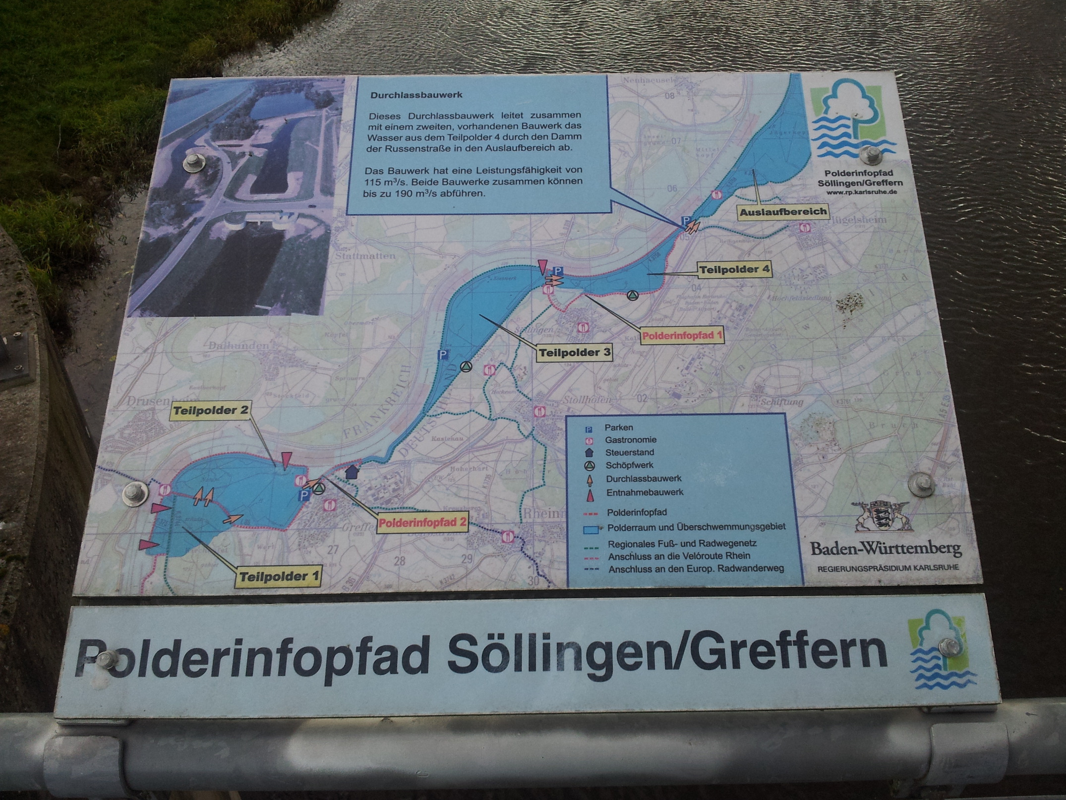 Polderinfopfad Söllingen/Greffern